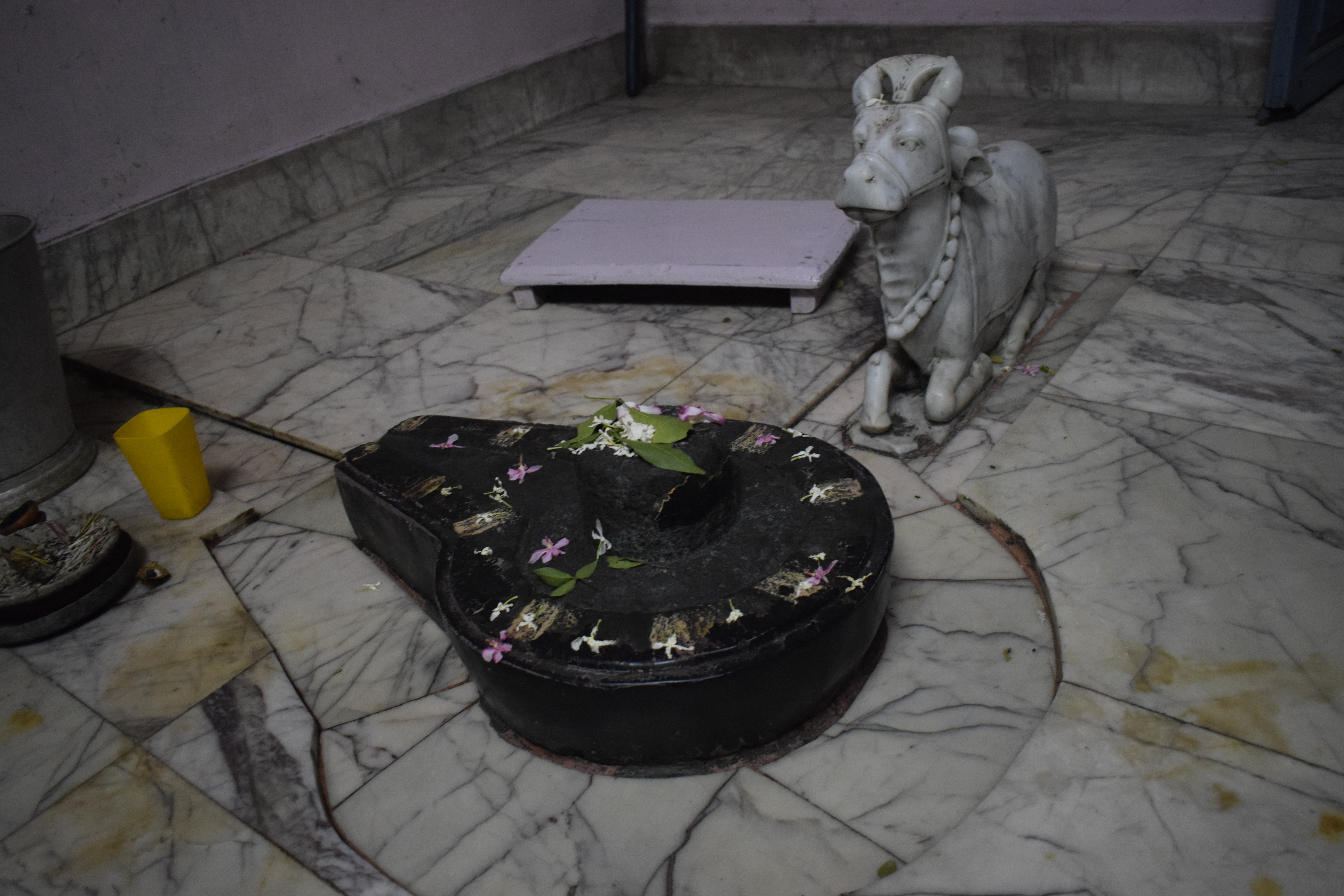 श्री शतकेश्वर लिंग